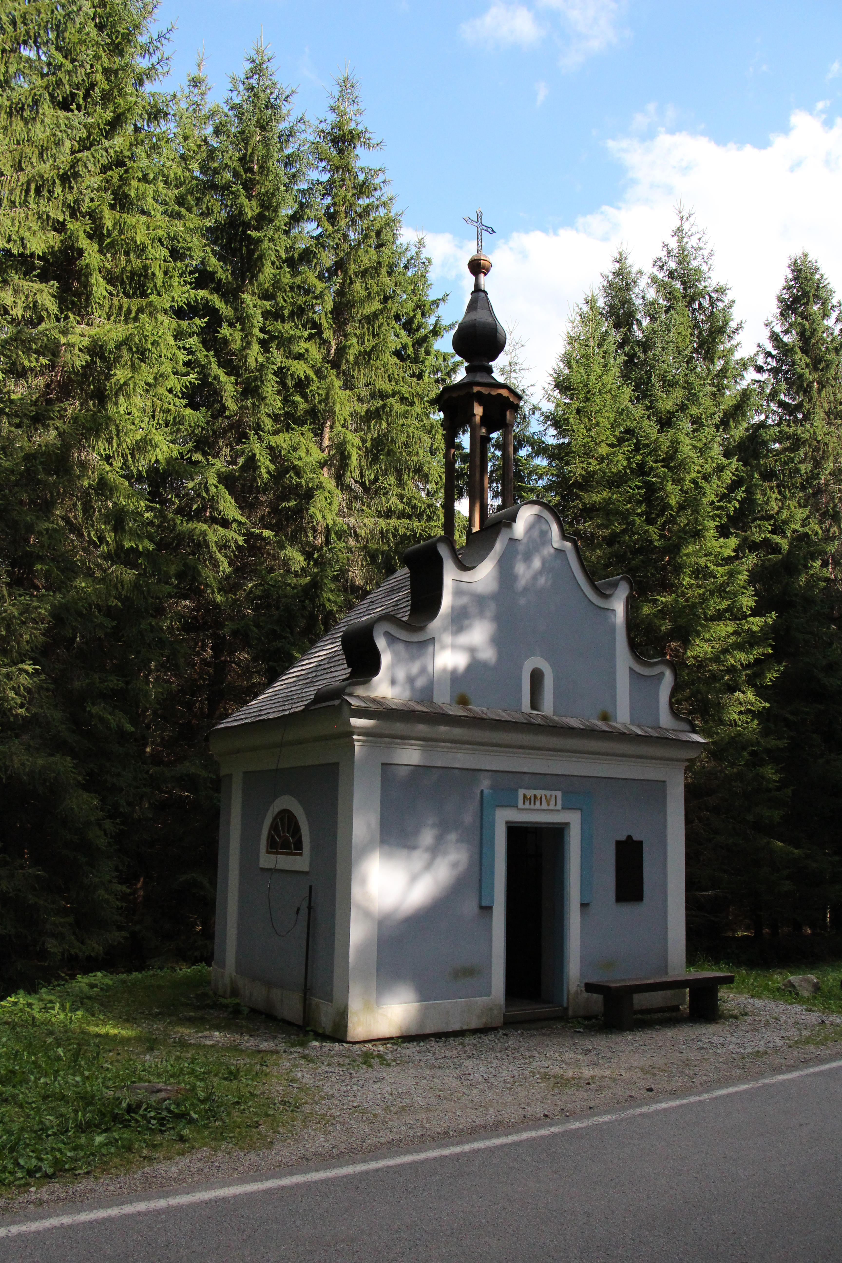 Kaple svaté Anny u silnice 167. Borová Lada. Okres Prachatice. Česká republika. - Google Maps - Google Earth